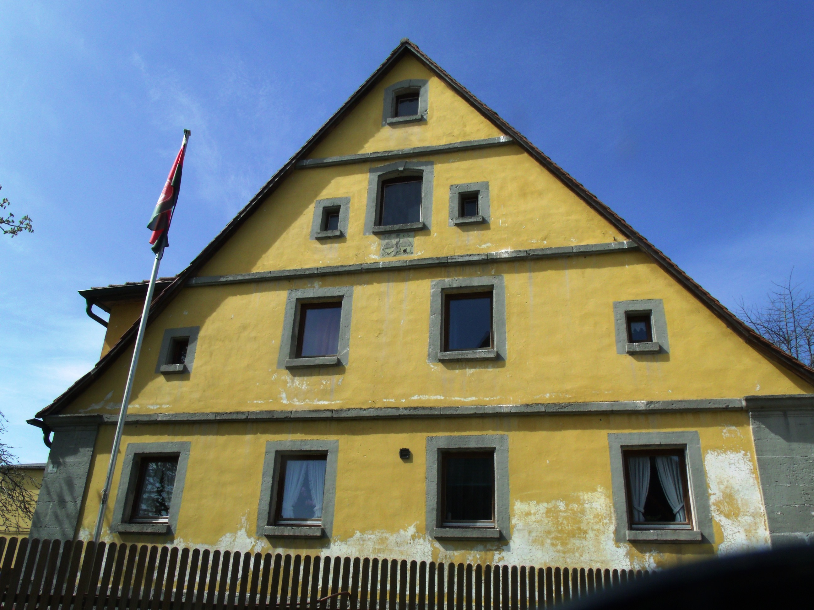 Steinberg, Ortsteil von Leutershausen im Landkreis Ansbach